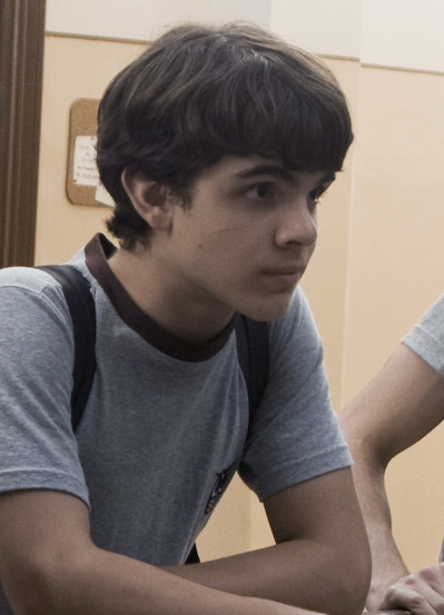 Eu não quero voltar sozinho (No quiero volver solo) es un cortometraje brasileño de 2010 dirigido por Daniel Ribeiro. Reparto Tess Amorim, Fabio Audi Fabio Audi